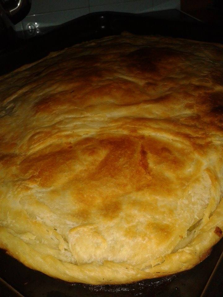 Bu fotoğraf Kosovalilarin vazgecilmez tadi olan "Pite"nin resmidir